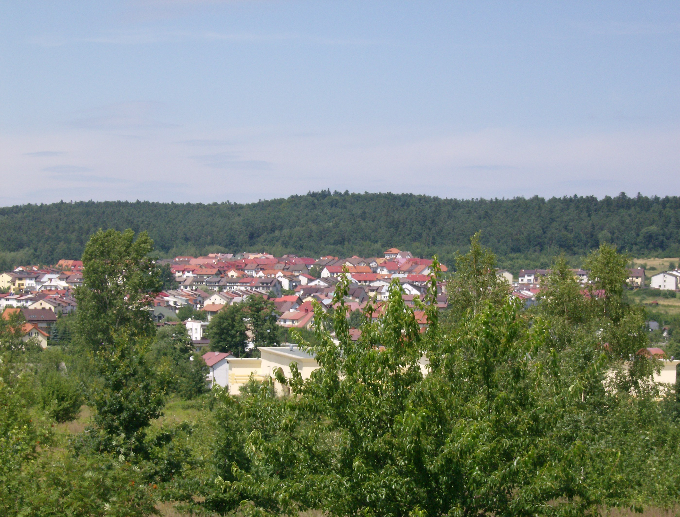 Osiedle Dąbrowa w Kielcach